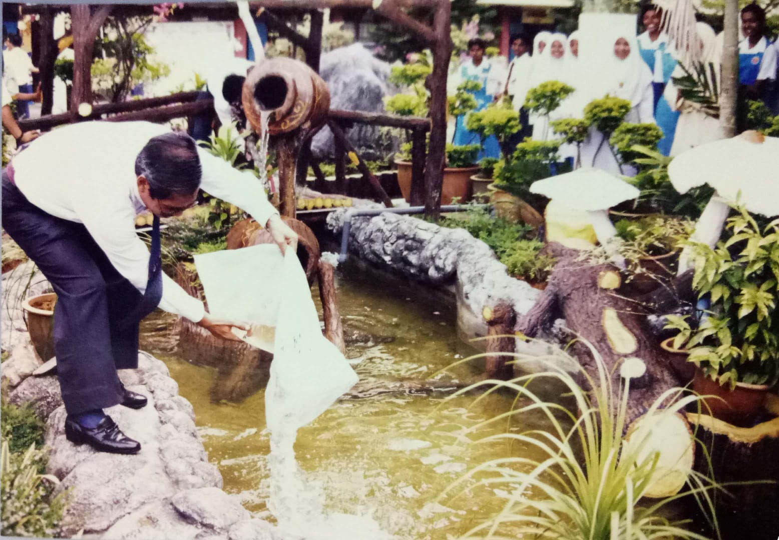 Kolam SMBB